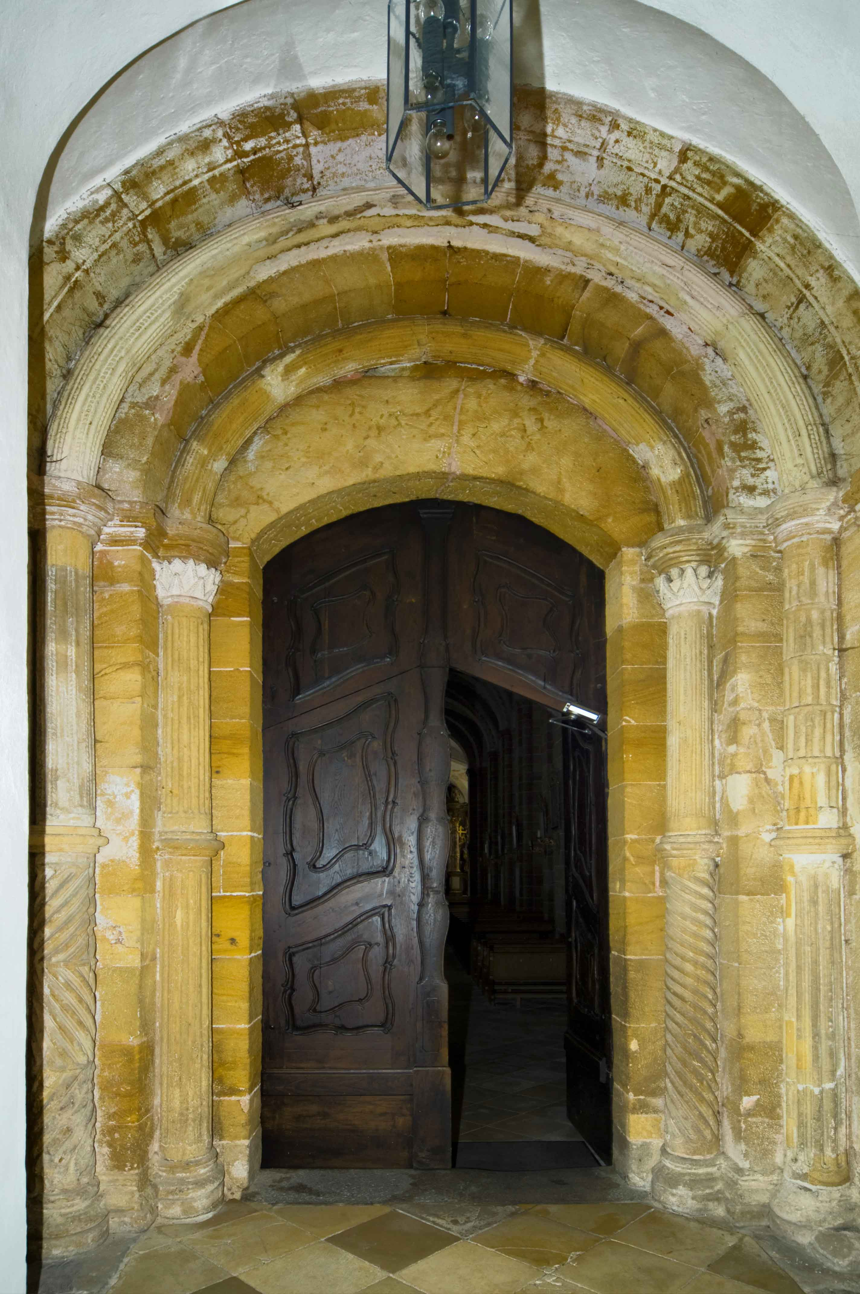 Kirchenansicht Kloster Walderbach, Romanisches Portal